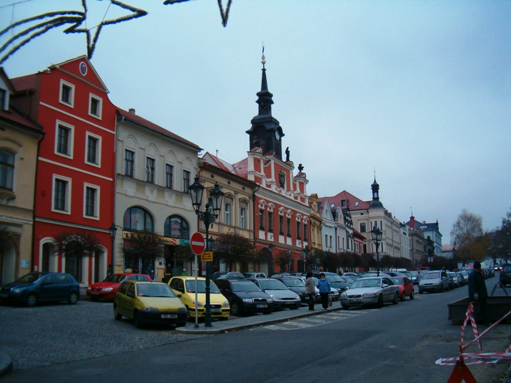 Resselovo náměstí se Starou radnicí - Chrudim